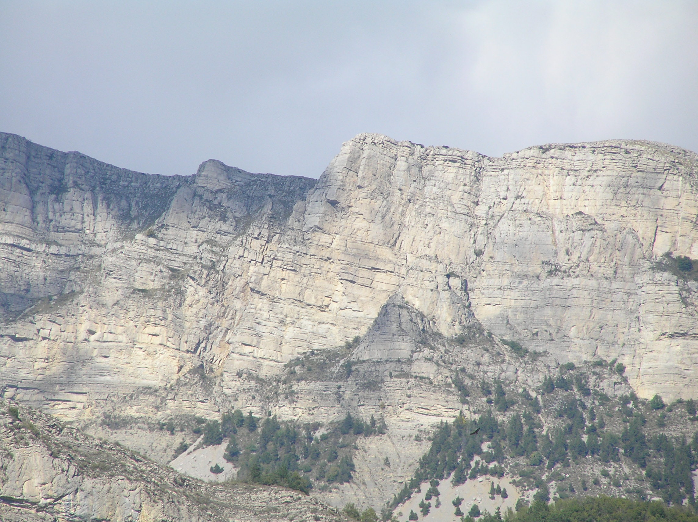 Les rochers de guéruen